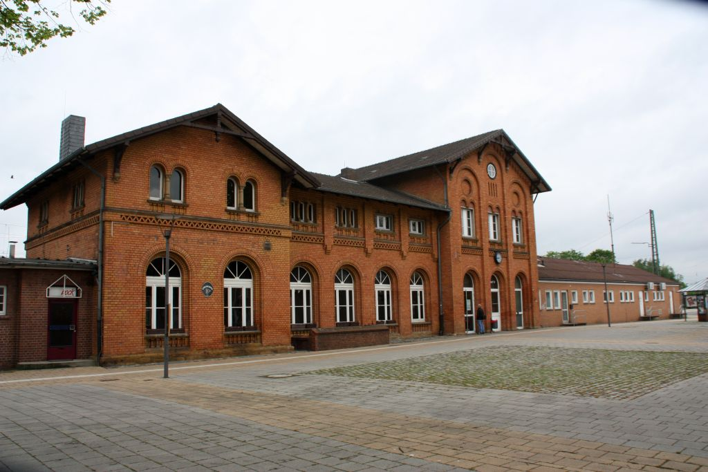 Der Bahnhof in Bohmte